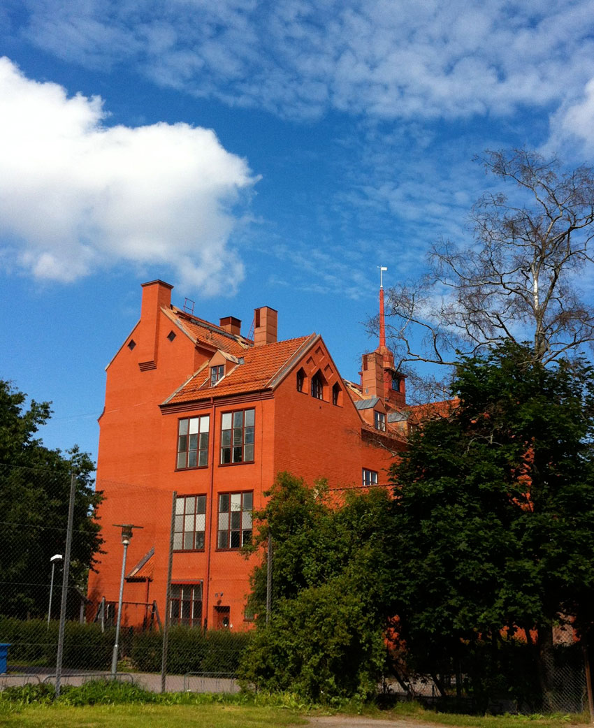 Örbyskolan från skolgård och bollplaner